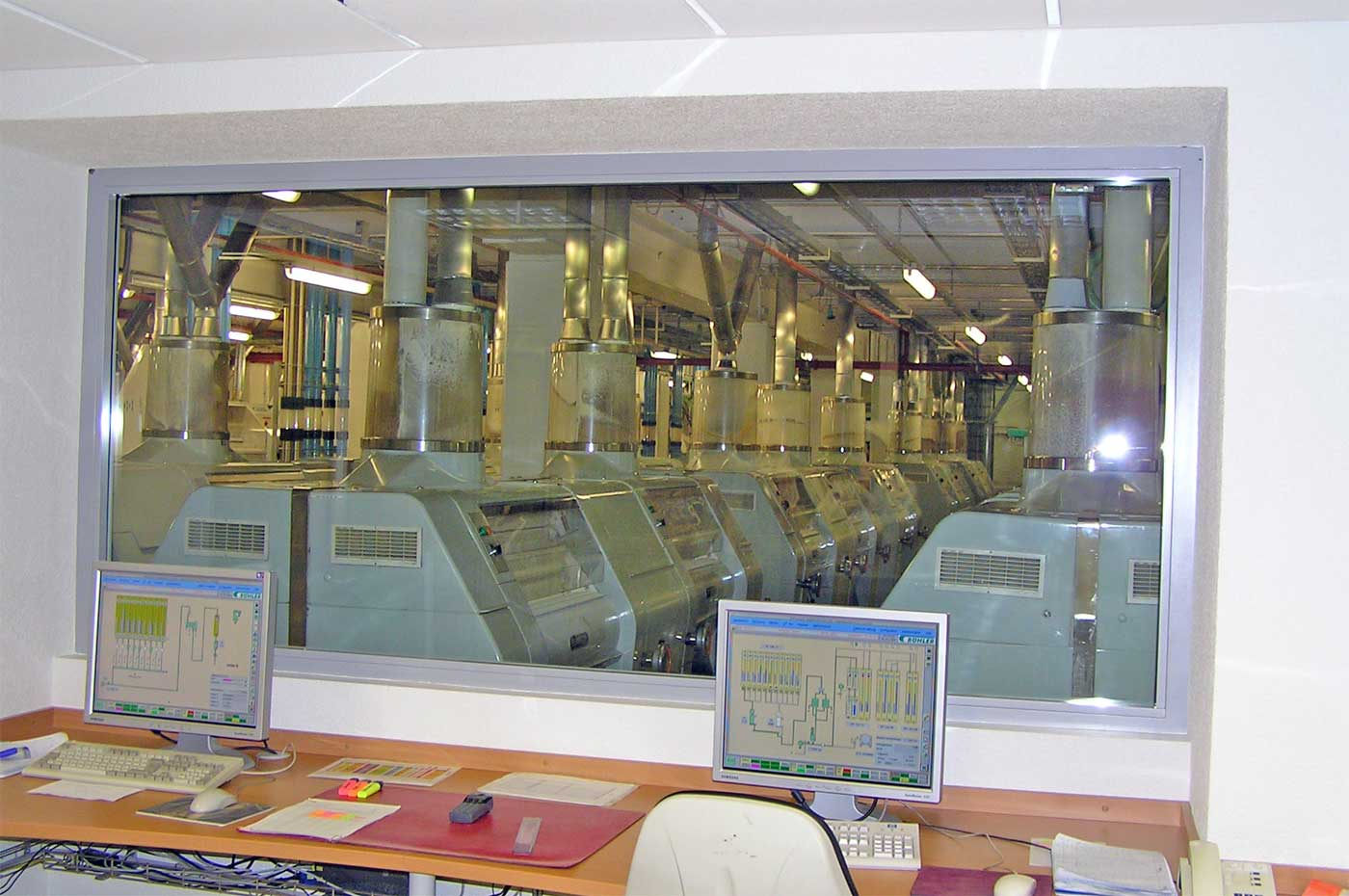 Beschreibung: Rechnergesteuerte Mühle, Fabrikat Bühler AG, selbst fotografiert, 2004 Fotograf: Benutzer:BMK 2004-12-30 Please send reference and voucher copy to BMK(at)clever.ms Bitte Quellenangabe und Beleg an BMK(at)clever.ms